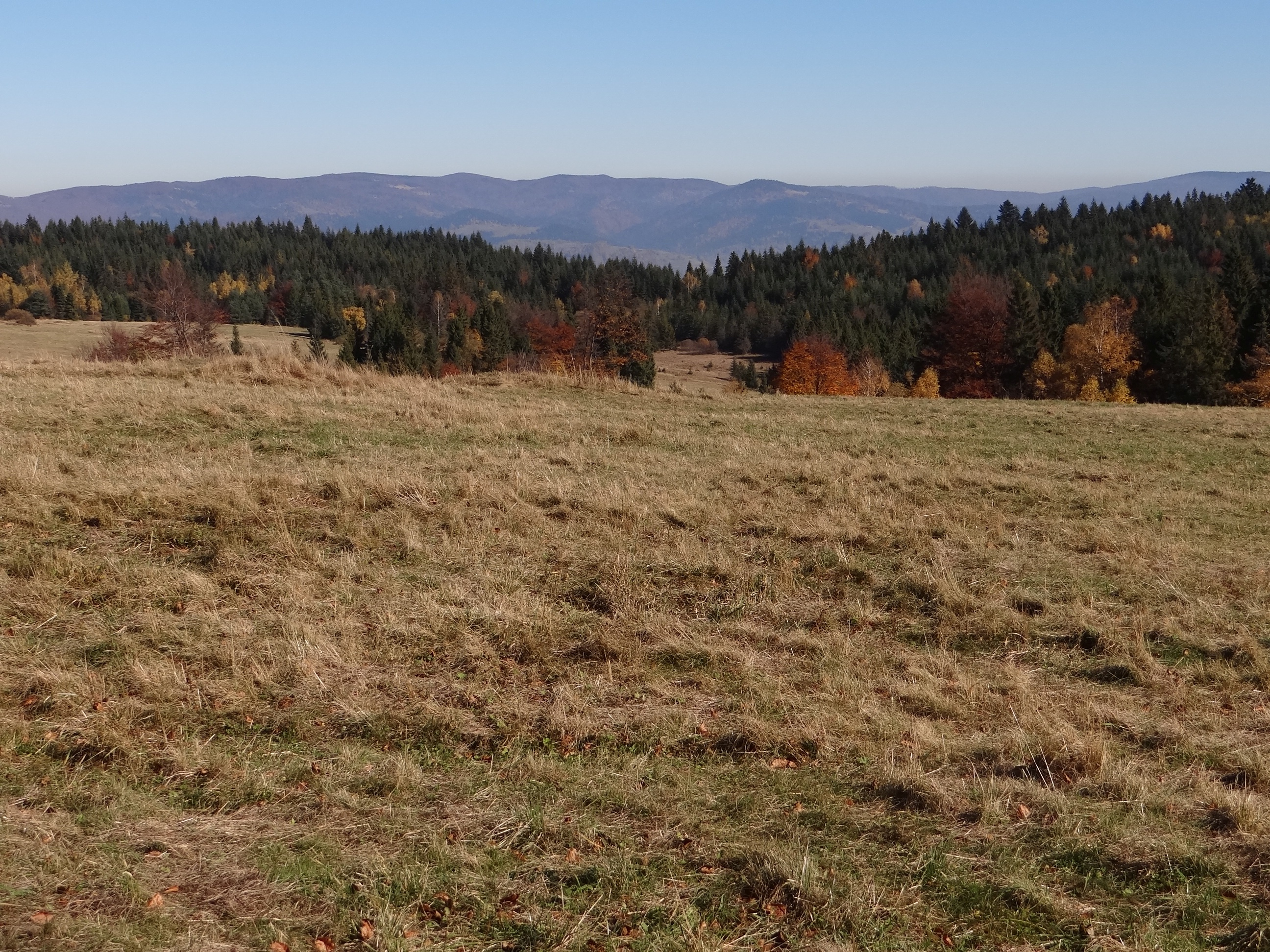 Widok z litmanowskich łak przy szczycie Hurcałki na Gromadzką Przełęcz i Pasmo Jaworzyny